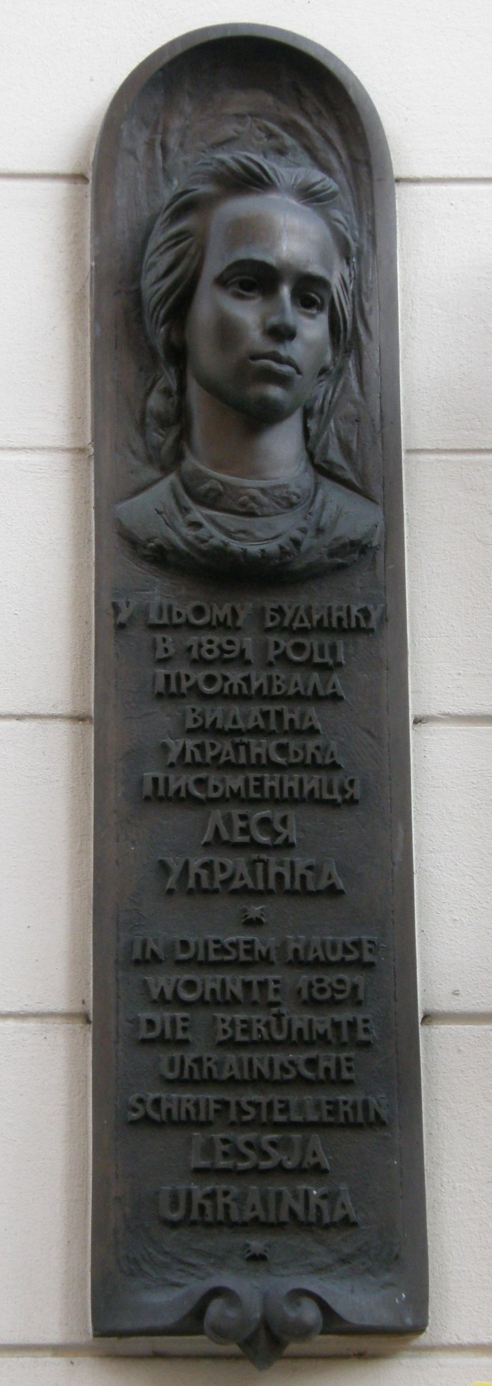 Lessja Ukraine Gedenktafel in Wien